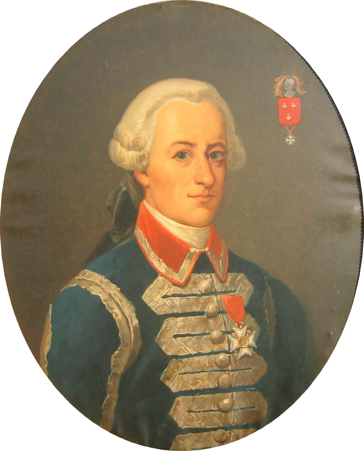 Portrait en buste de Raoul IV de La Barre de Nanteuil (1743-1833), col. part. - préciser l'âge de la personne SVP.